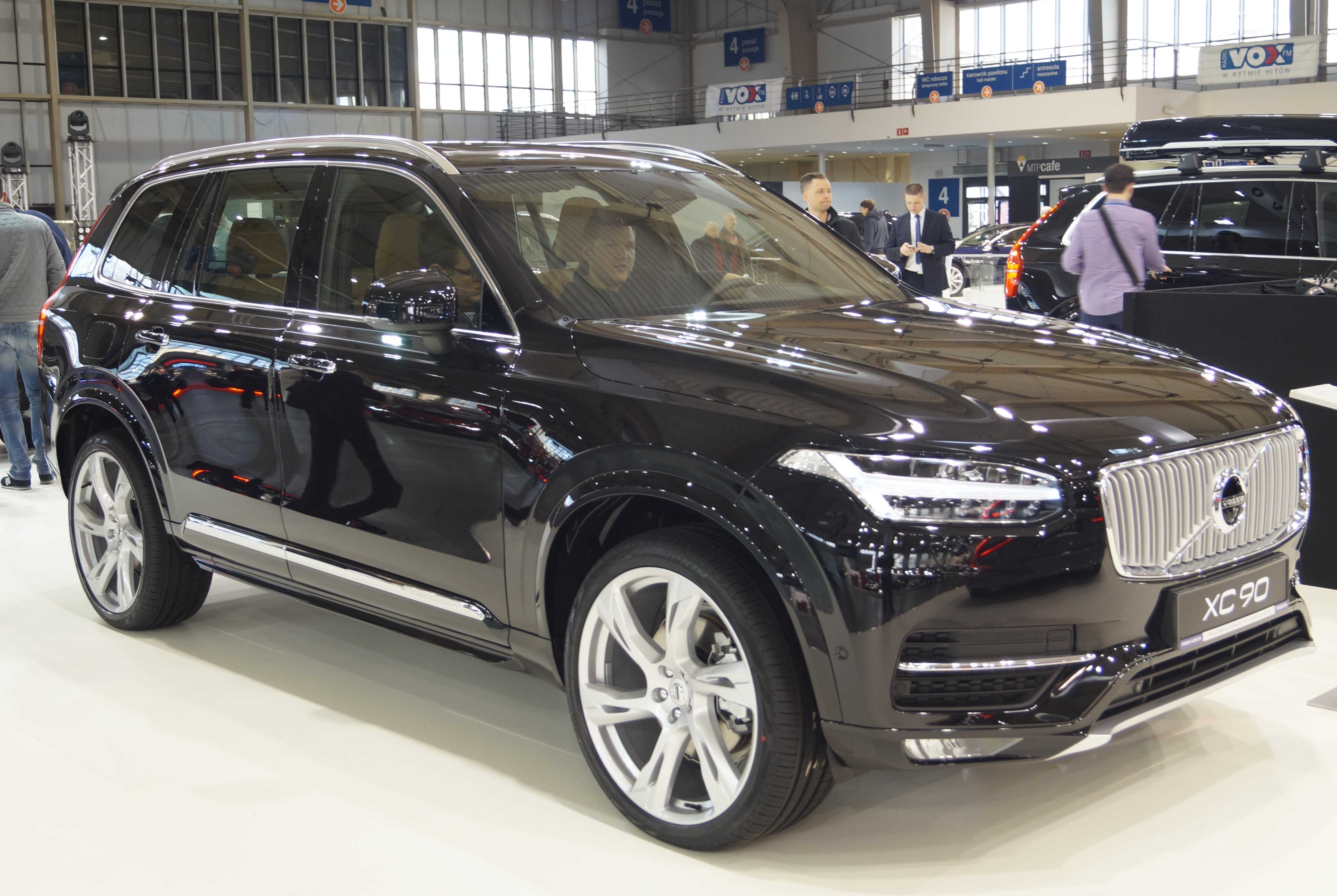 Prawy przód Volvo XC90 na Motor Show Poznań 2017.